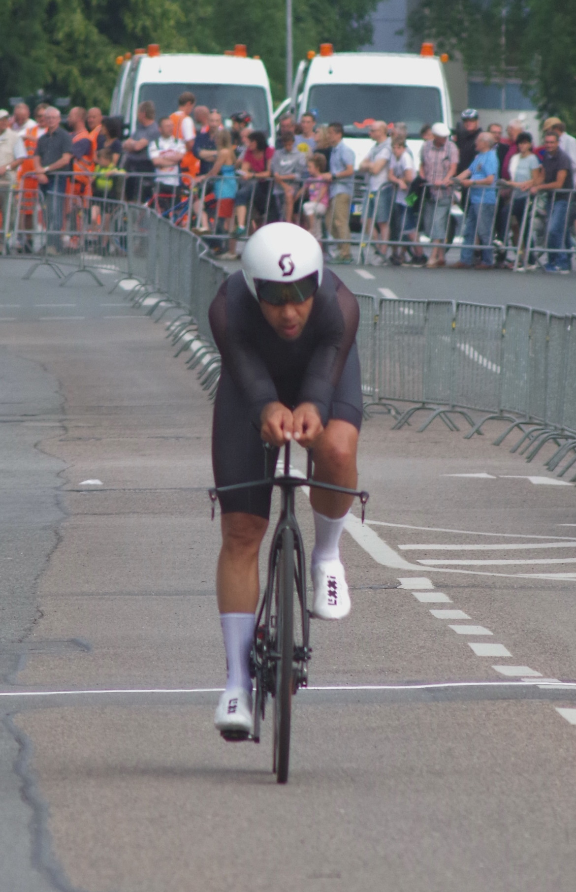 Deutsche Meisterschaften im Einzelzeitfahren 2017 23. Juni 2017 Zieleinfahrt The making of this document was supported by the Community-Budget of Wikimedia Germany.